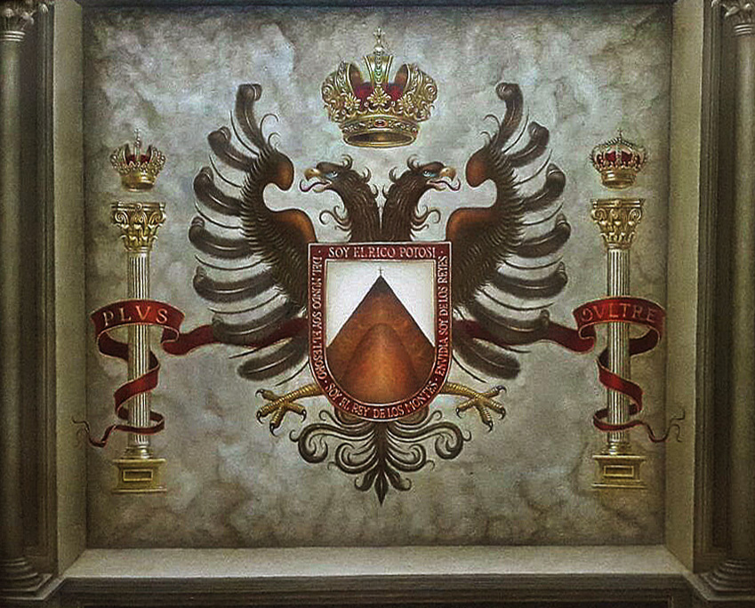 Primer escudo de la Villa Imperial de Potosí, obra de Saulo Mariscal B.